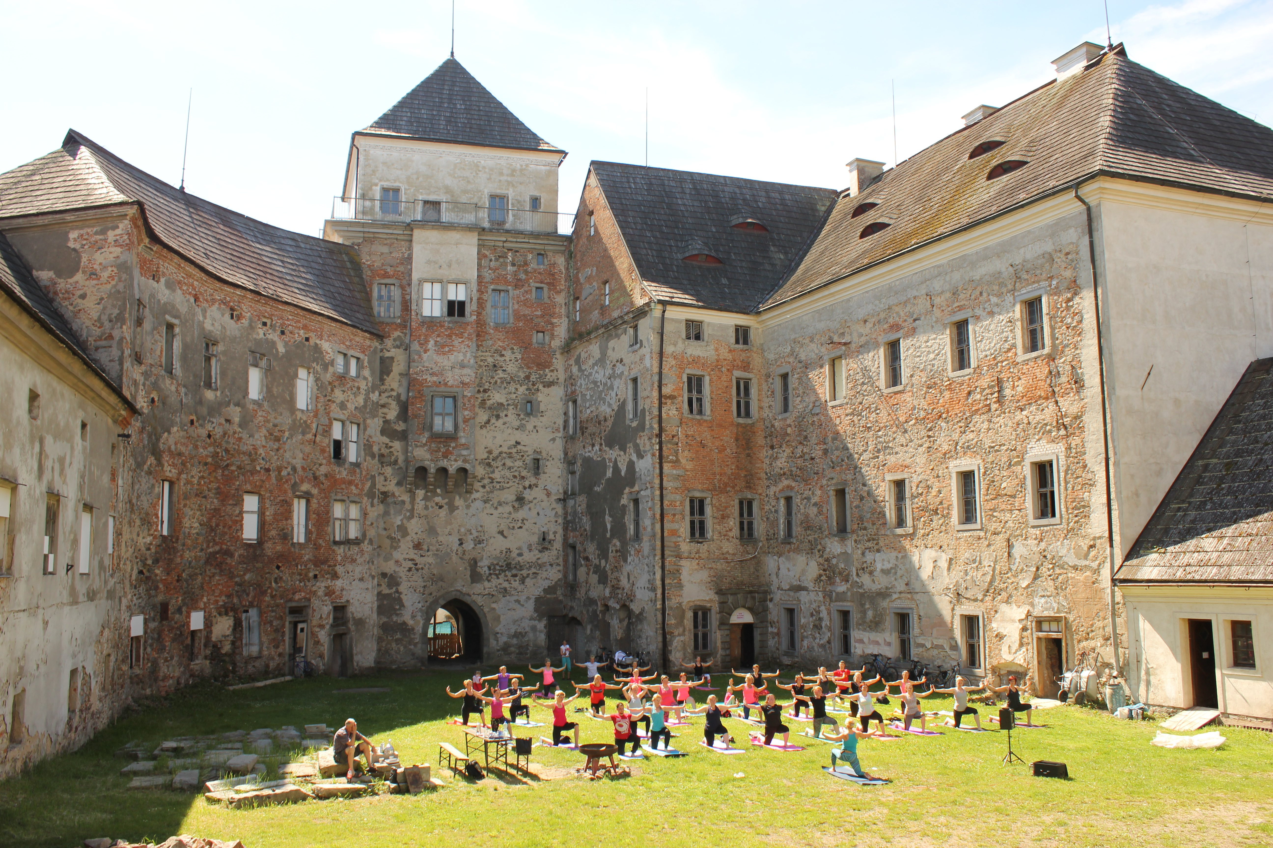 Cvičení jógy na nádvoří zámku Rožmitál